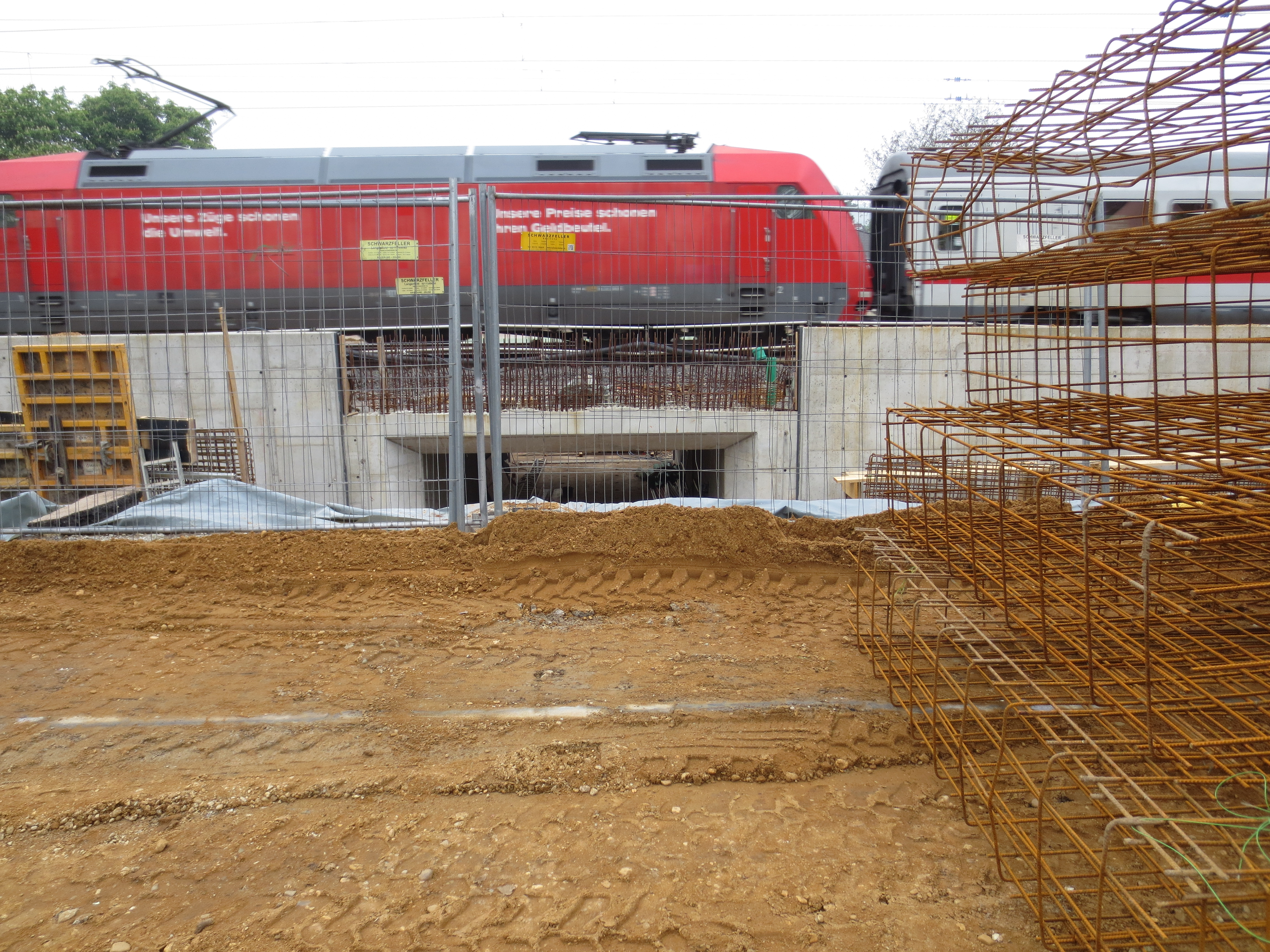 Neuer Fußgängertunnel (Fahrradfahrer) am Haltepunkt Bonn UN Campus